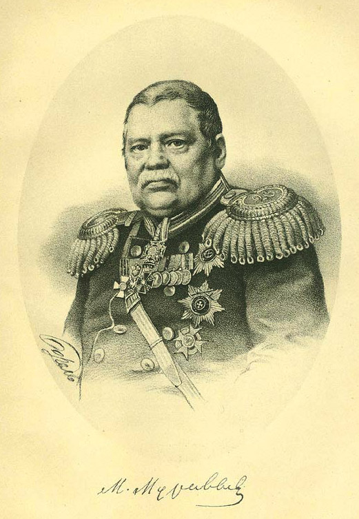 Mikhail Nikolayevich Muravyov (Михаил Николаевич Муравьёв) (1796-1866). Generalgoverneur of Vilnius in 1863-1865.